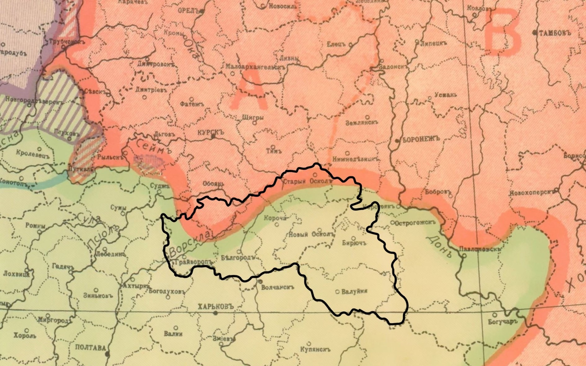 Лингвистический состав территории Белгородской области 1914